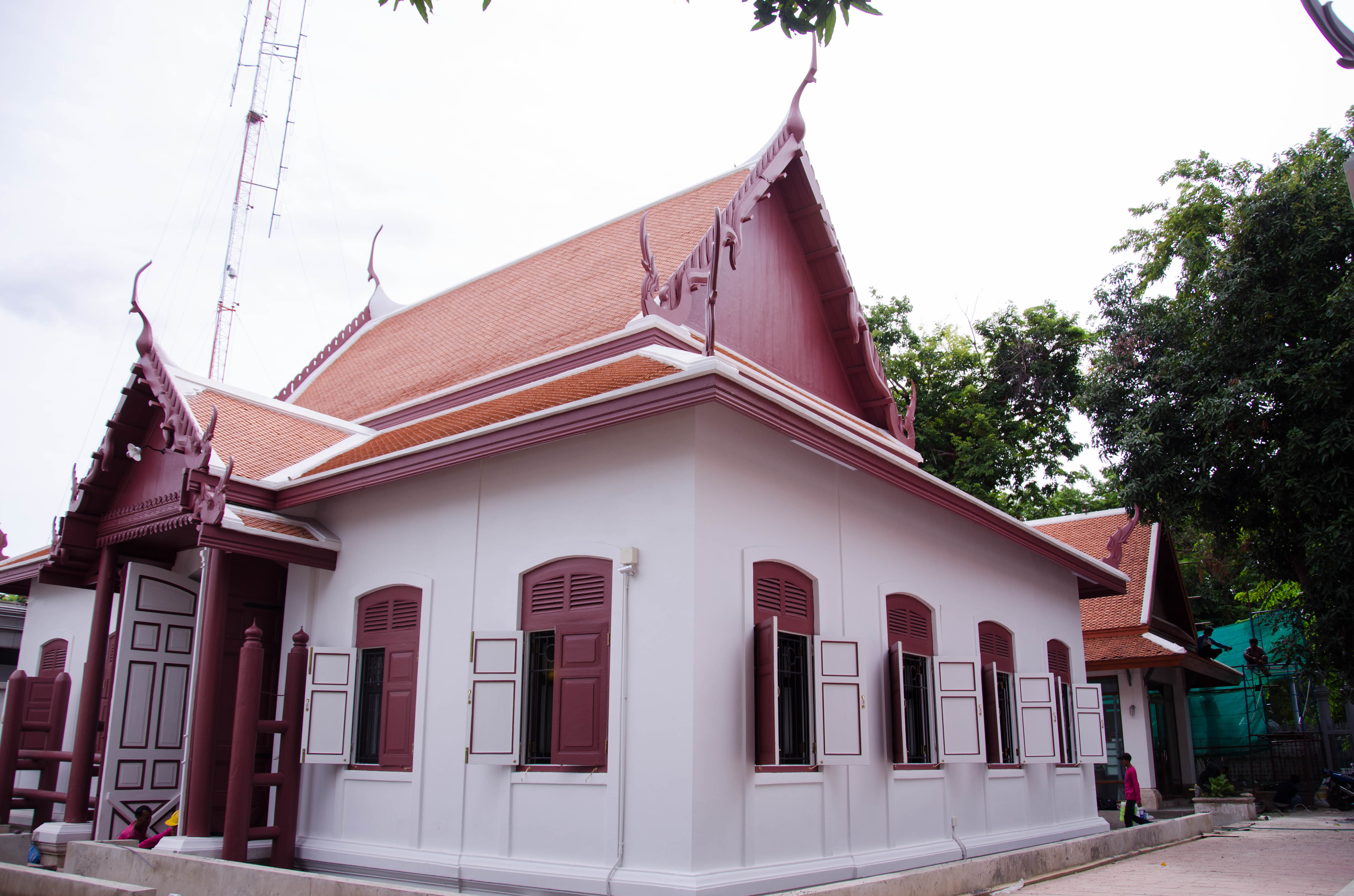 โรงช้าง